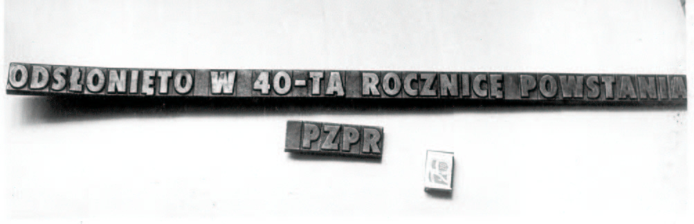 Kawałek tablicy upamiętniającej redakcję "Robotnika" na ul. Wareckiej 7, w Warszawie, odkuty przez członków PPS